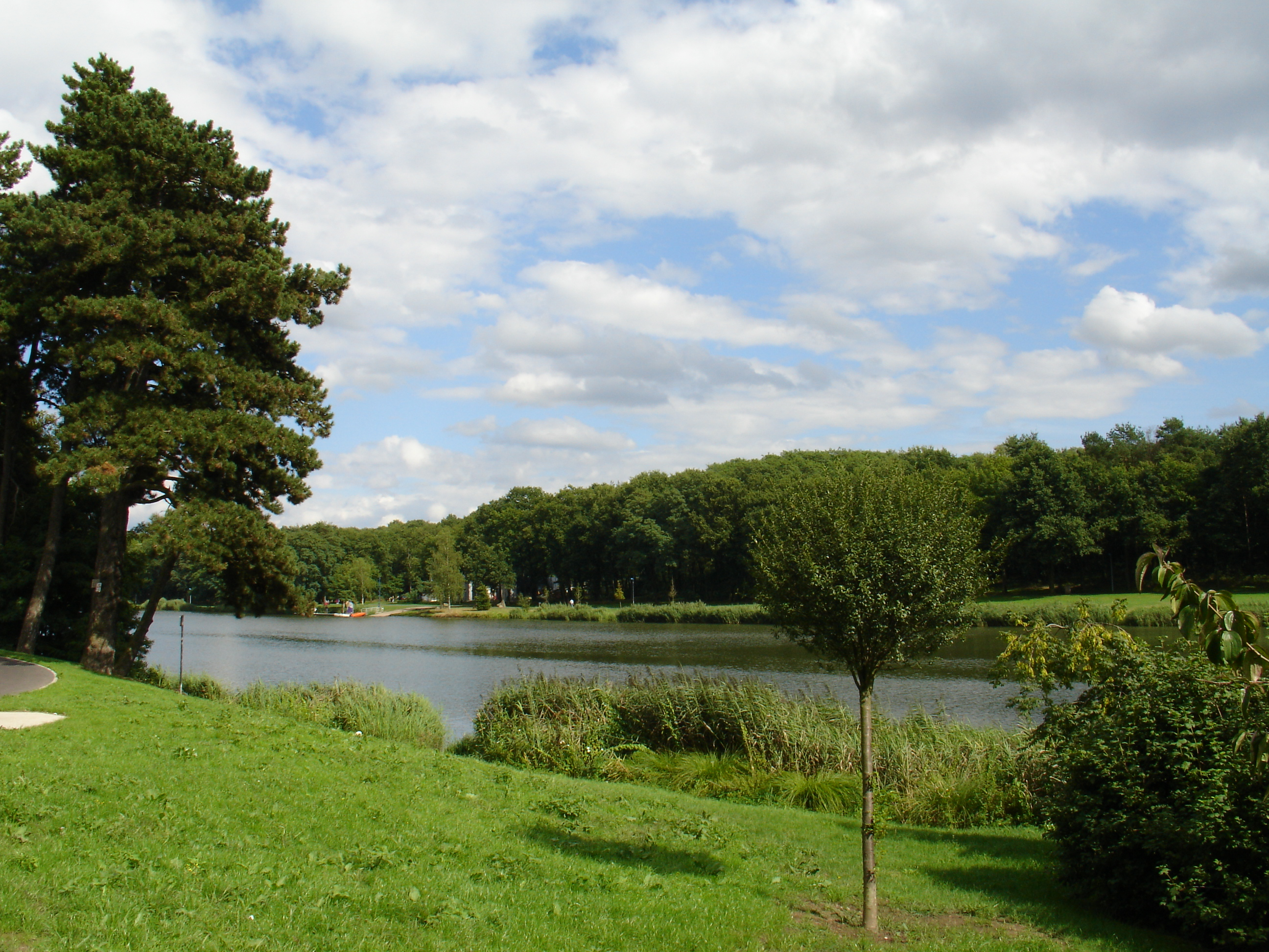 Le lac de Creutzwald.